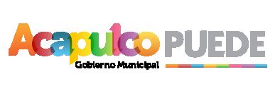 Logotipo usado por Luis Walton, presidente municipal de Acapulco 2012-2015